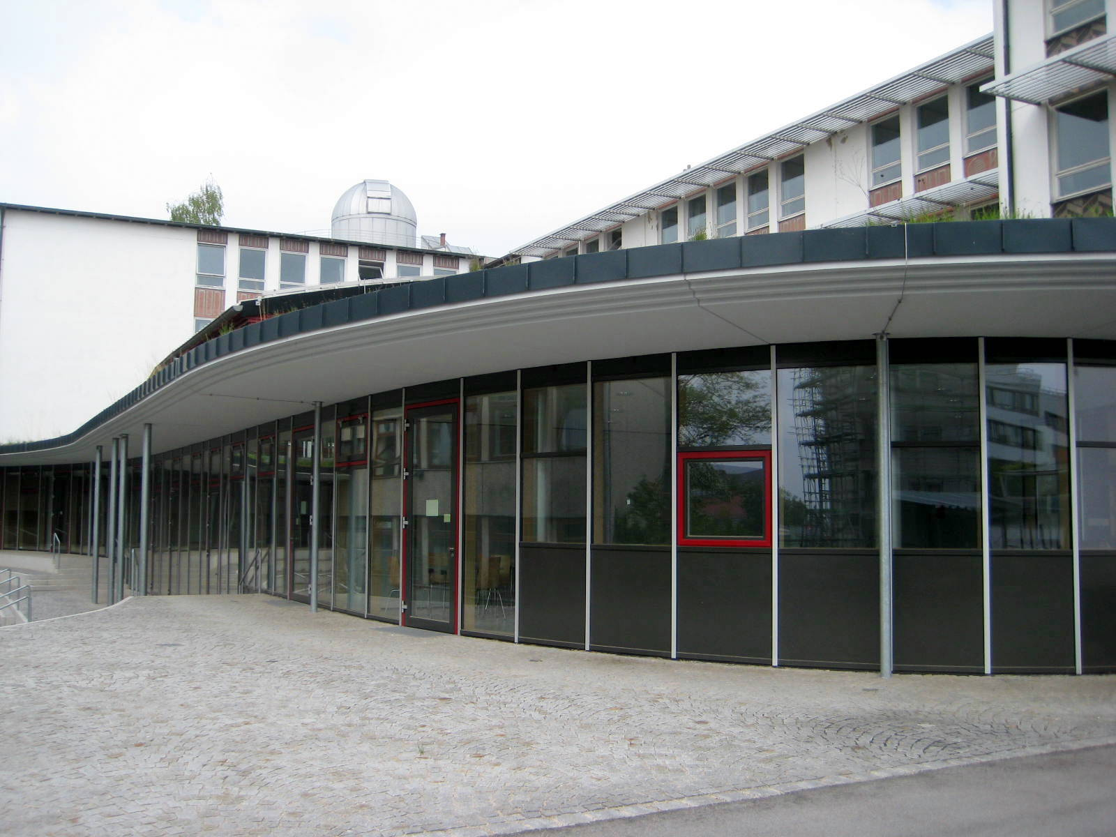 Dies ist die Aula, der neueste Bauteil des JoHo in Freising.